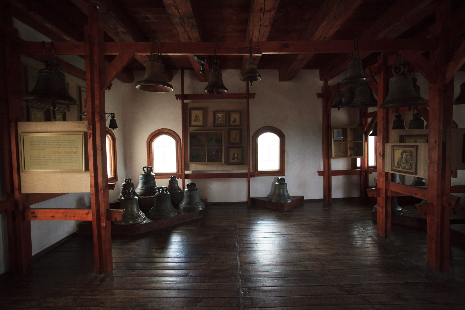 Владича башта (мур.) 13-15 ст. ст.